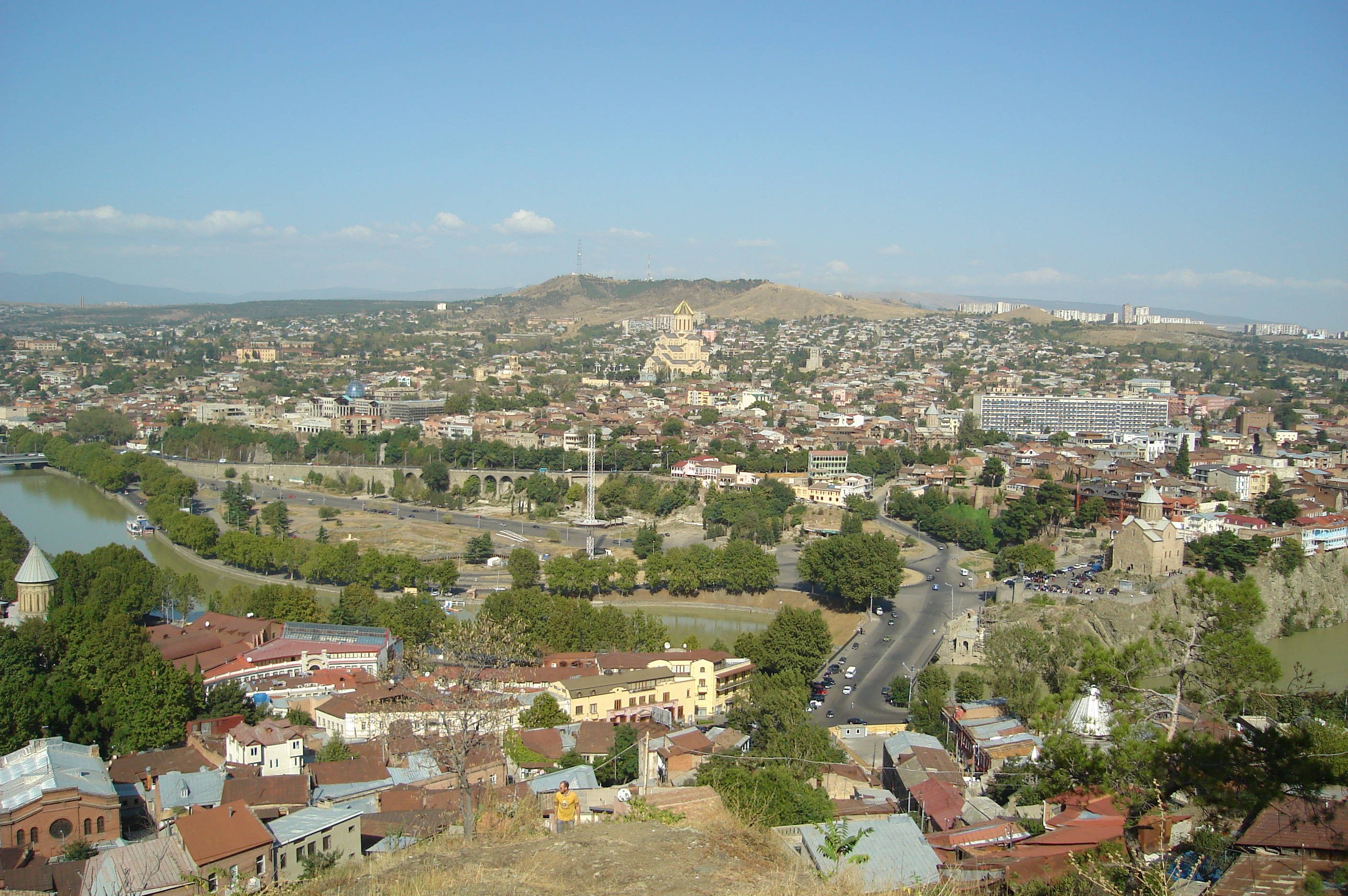 Old Tbilisi